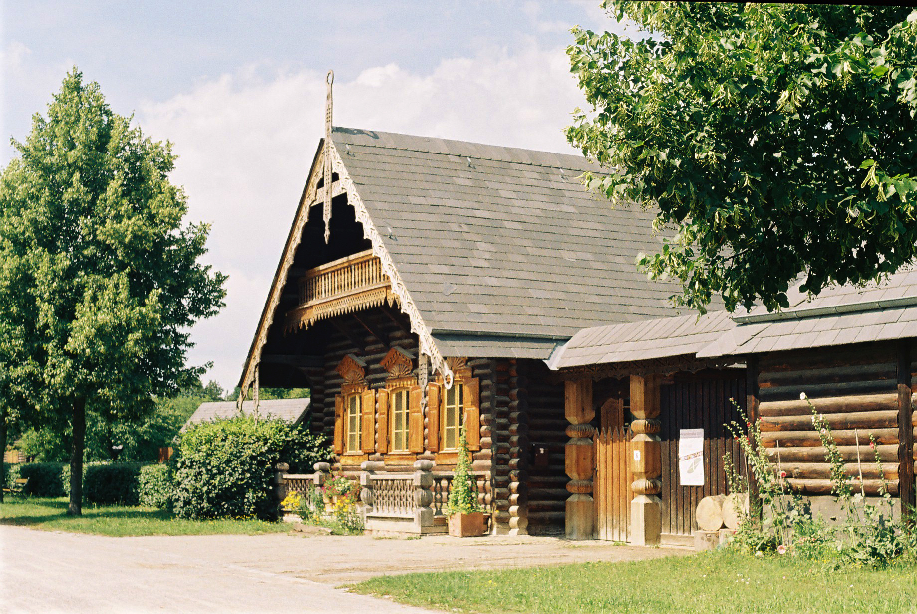 Russische Kolonie Alexandrowka in Potsdam (Brandenburg), Russische Kolonie 1-14, ID-Nummer 09155738